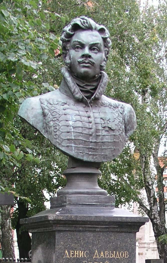 Büste vom Grabmal Denis' Dawydow auf dem Gelände des Nowodewitschi-Klosters